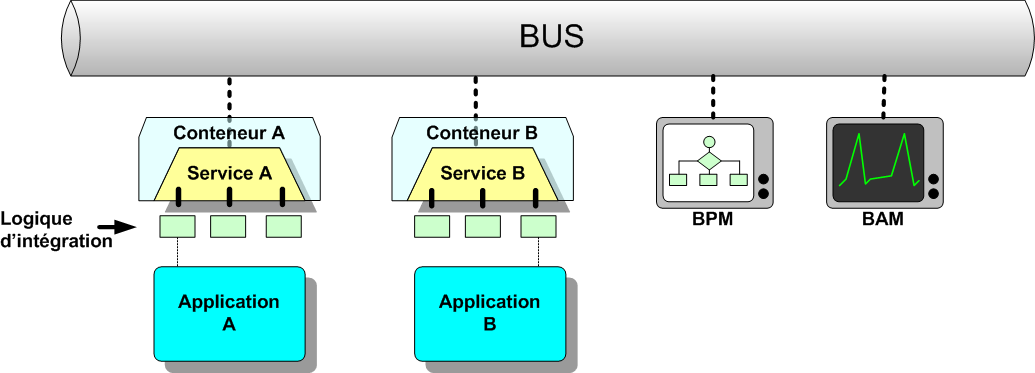 Architecture d'un ESB